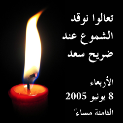 إعلان مظاهرة كفاية يوم 8 يونيو 2005 عند ضريح سعد زغلول في القاهرة احتجاجا على ضرب المتظاهرين يوم الاستفتاء على تعديل الدستور المصري 25 مايو 2005. انتشرت هذه اللافتة على المدونات كوسيلة للحشد إلى المظاهرة.